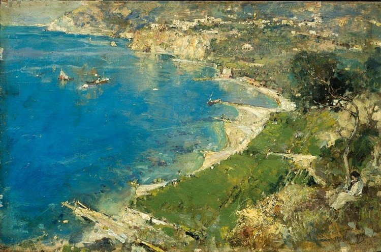 Giuseppe Casciaro, La Côte de Sorrente (1915), huile sur panneau, 31,5 x 45 cm, collection particulière.